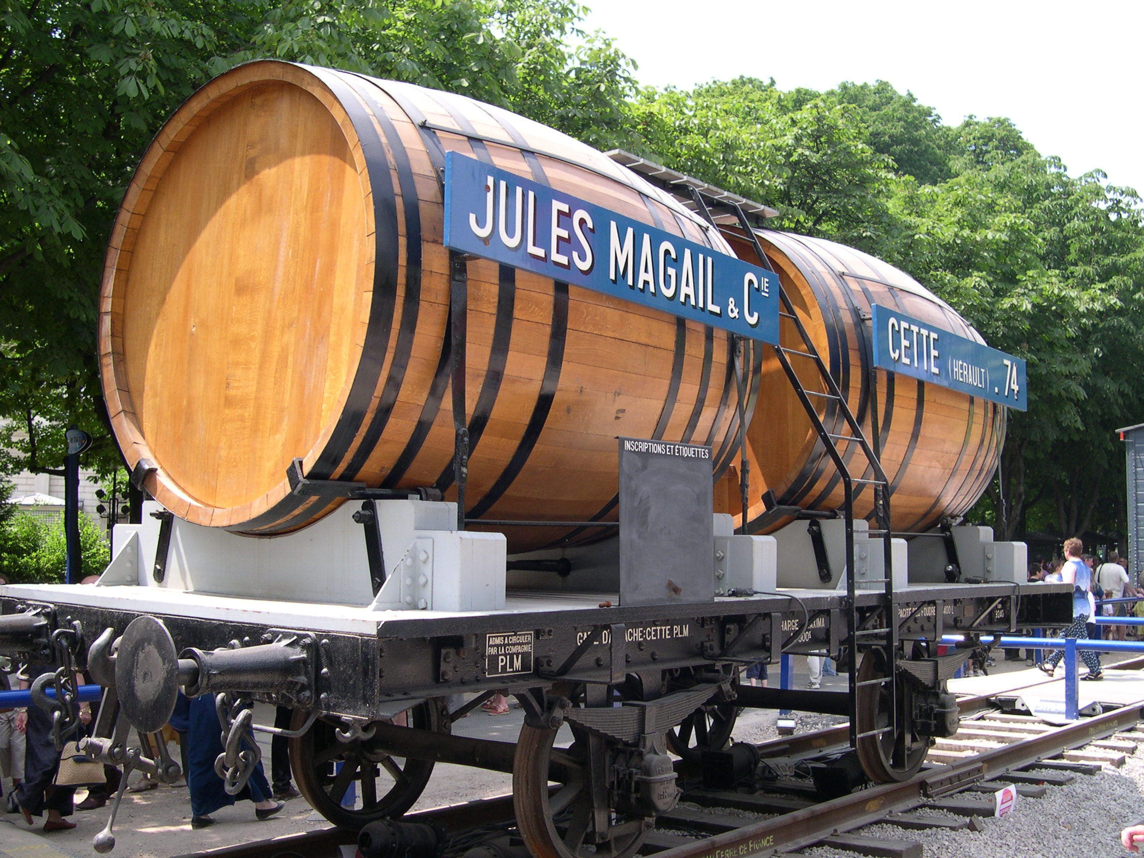 France Paris Champs Elysées Expo Train capitale 2003 Wagon bi-foudres